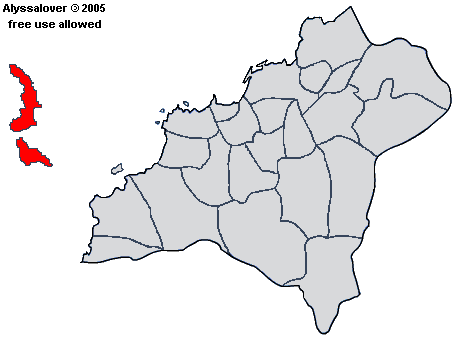 Mapa coa localización da parroquia de Cíes, Vigo.